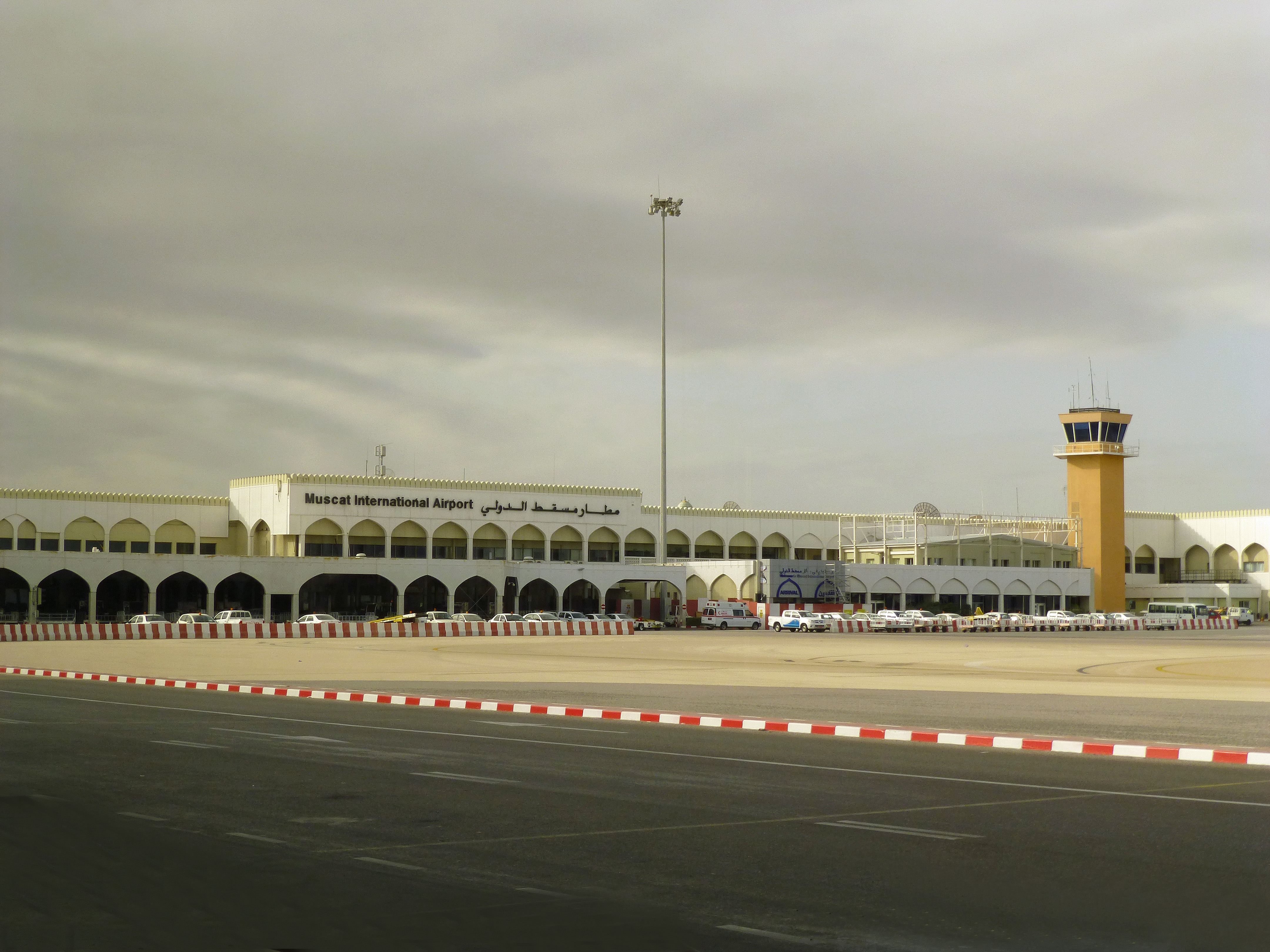 Aéroport international de Mascate (Oman)